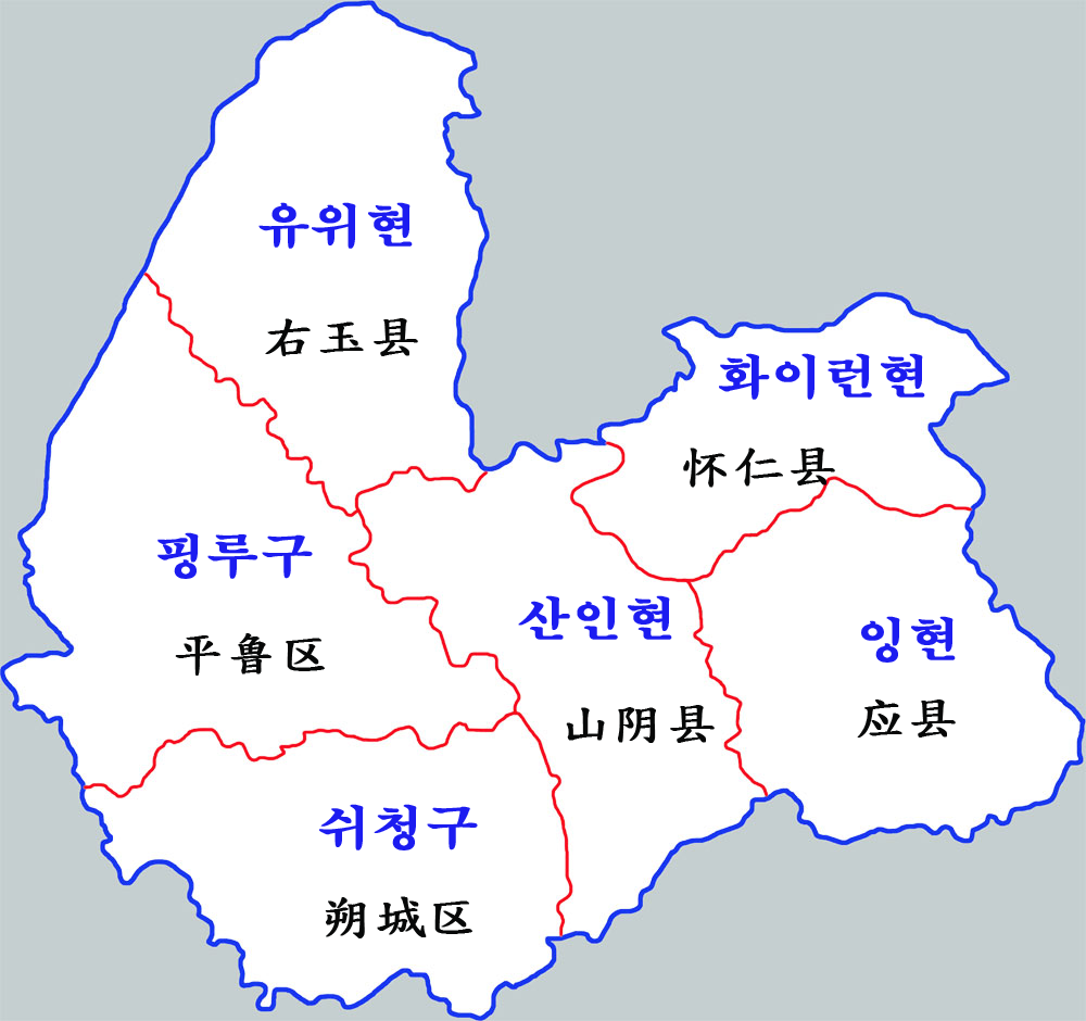 숴저우시 현급구역도